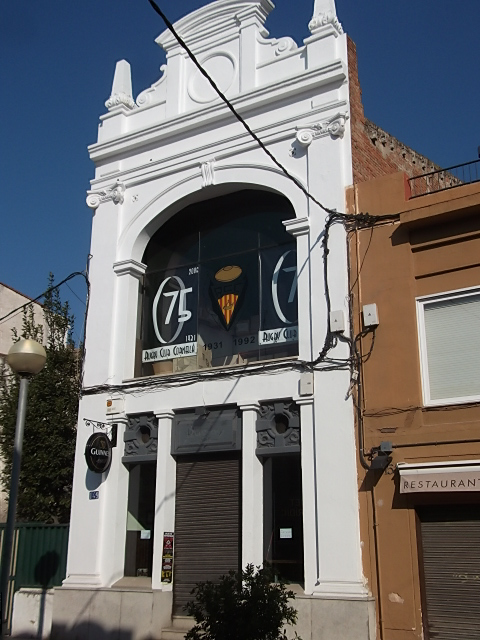 Seu del Club de Rugbi Cornellà